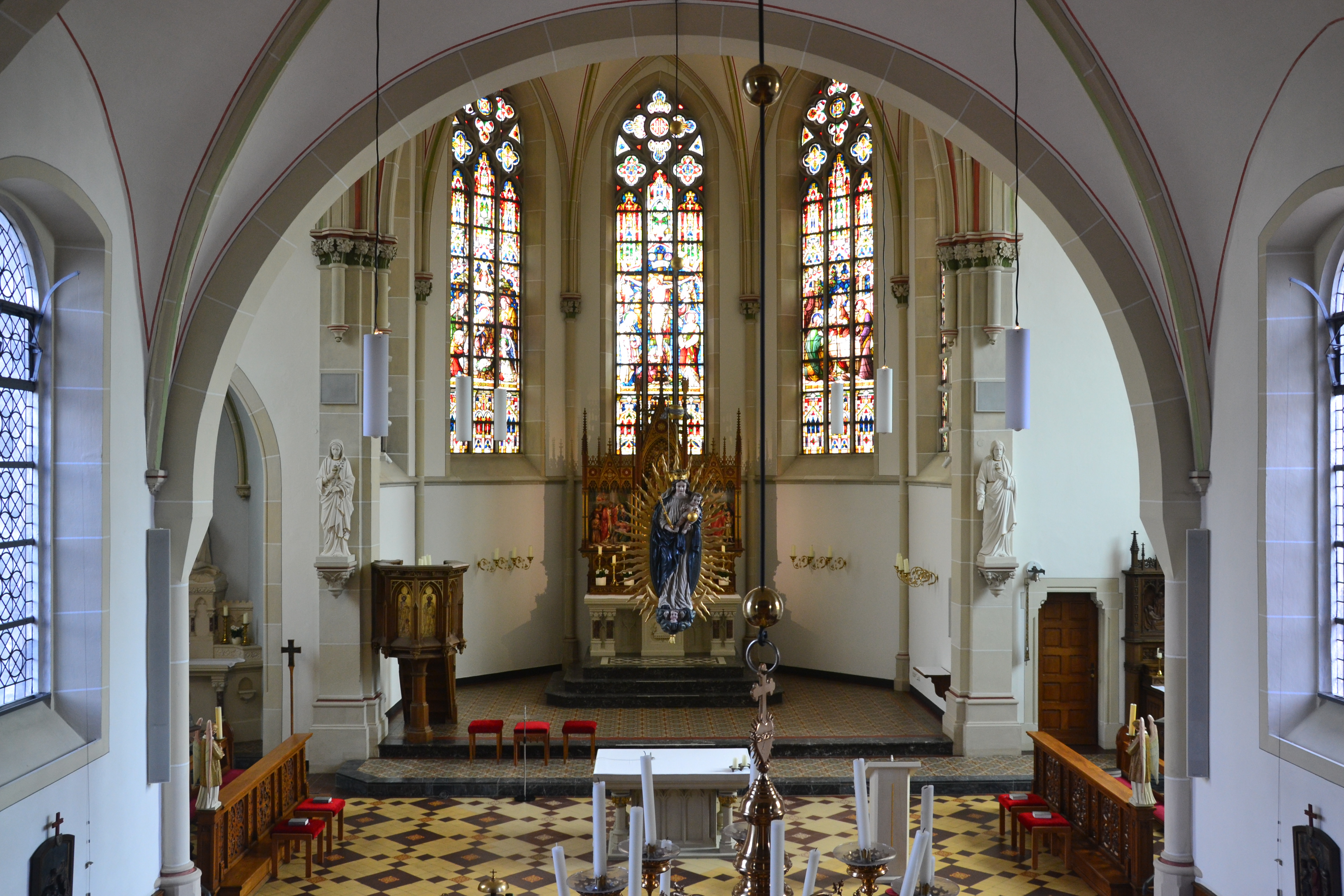 Der Hochaltar wurde im Jahre 1903 errichtet und zeigt die wunderbare Brotvermehrung und die Hochzeit zu Kana.